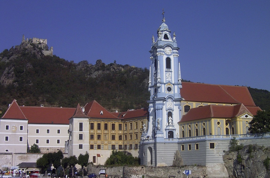 Dürnstein 2004 Autor: Denis Barthel